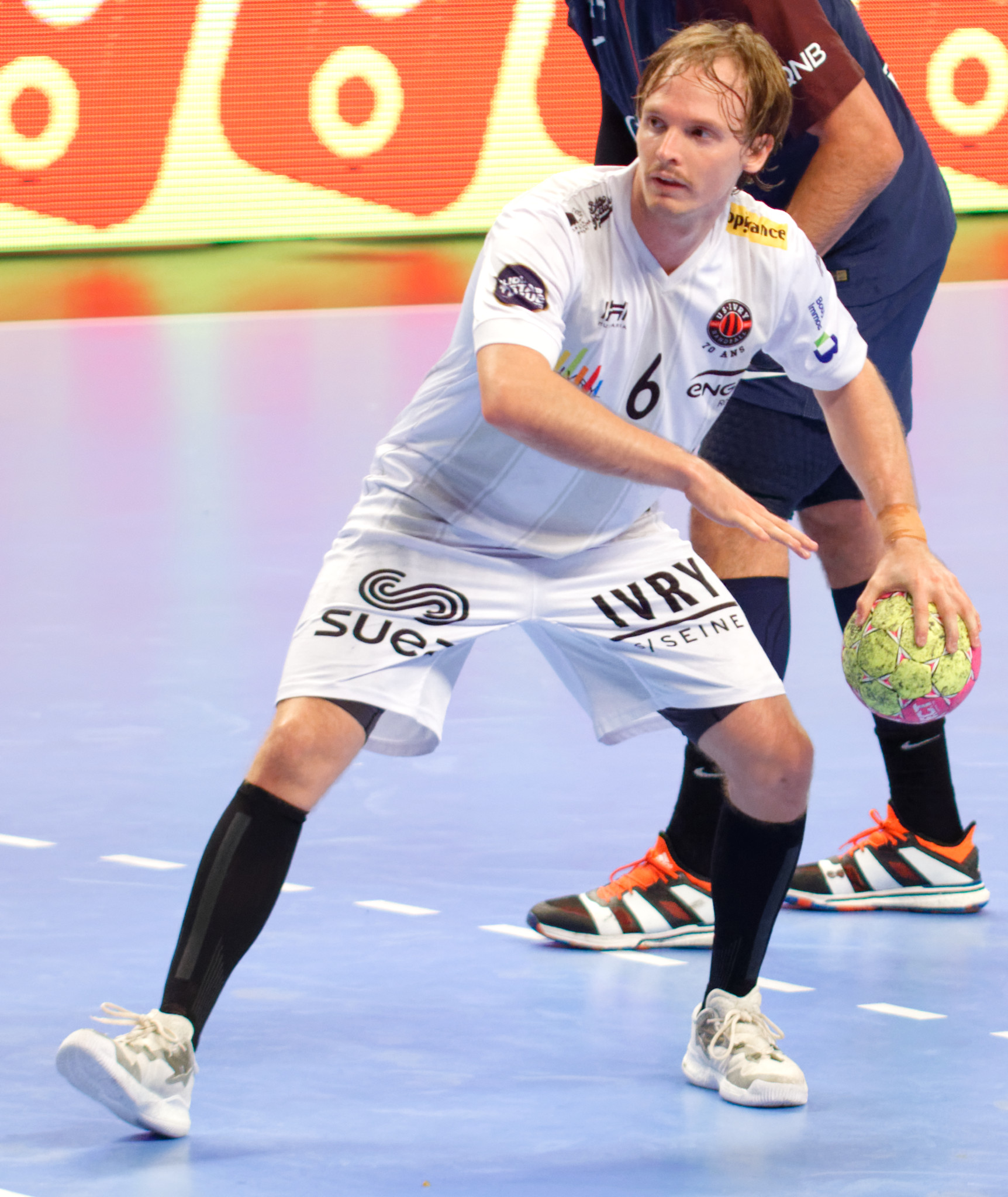 Rencontre de championnat entre le PSG et l'US Ivry A coubertin, le 14 septembre 2017.